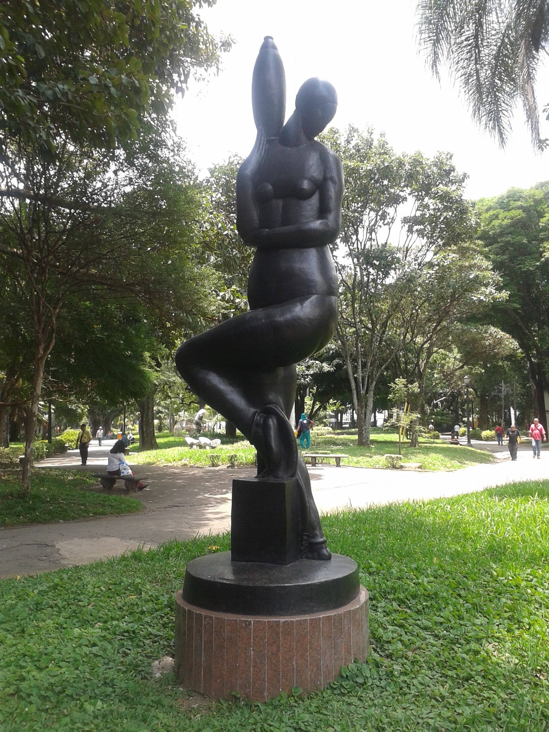 Monumento presente no interior do Parque da Luz, na cidade de São Paulo.